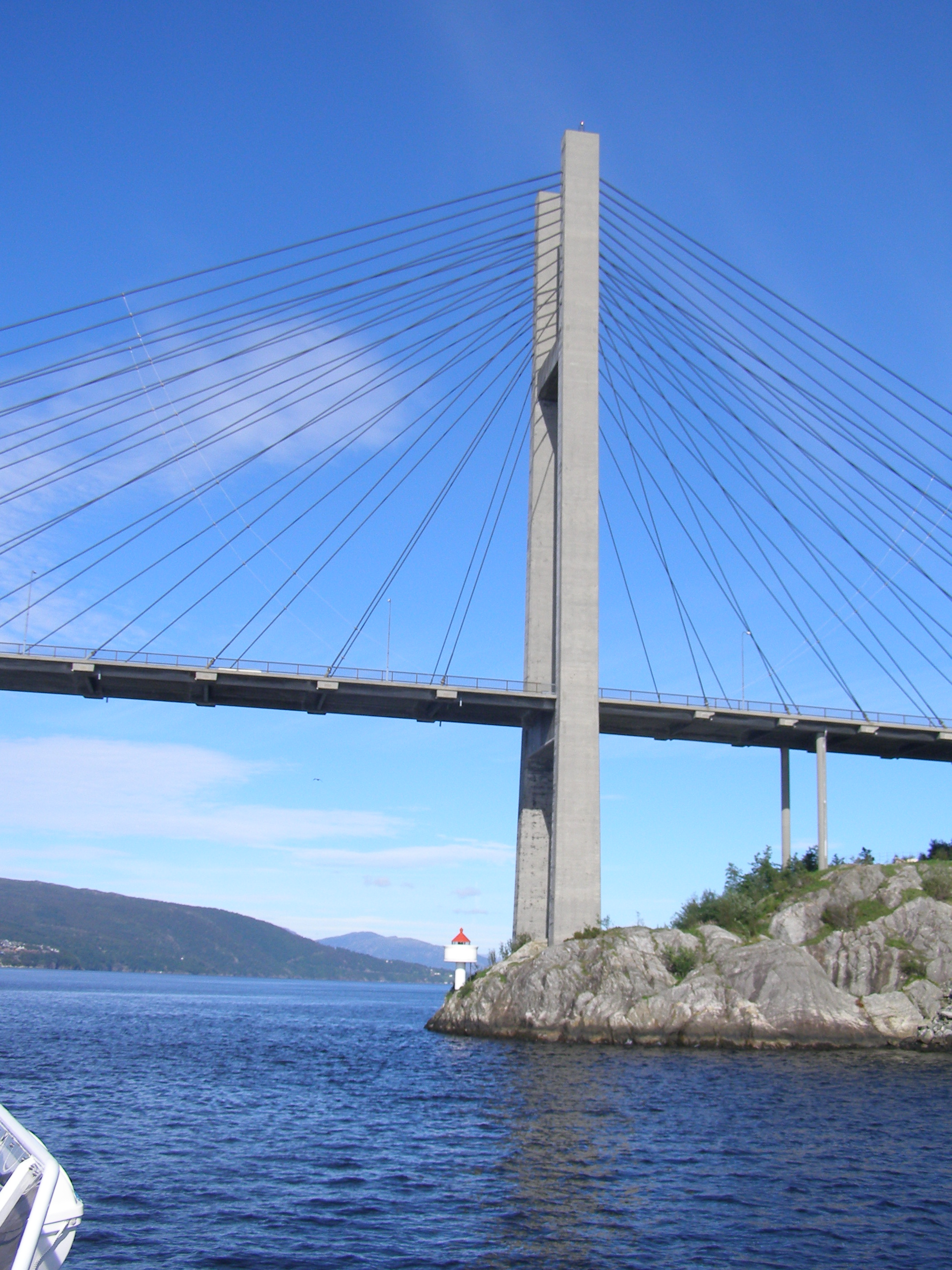 Nordhordlandsbrua Nordhordland bridge, near Bergen / Norway Nordhordland-Brücke, unweit von Bergen, Norwegen